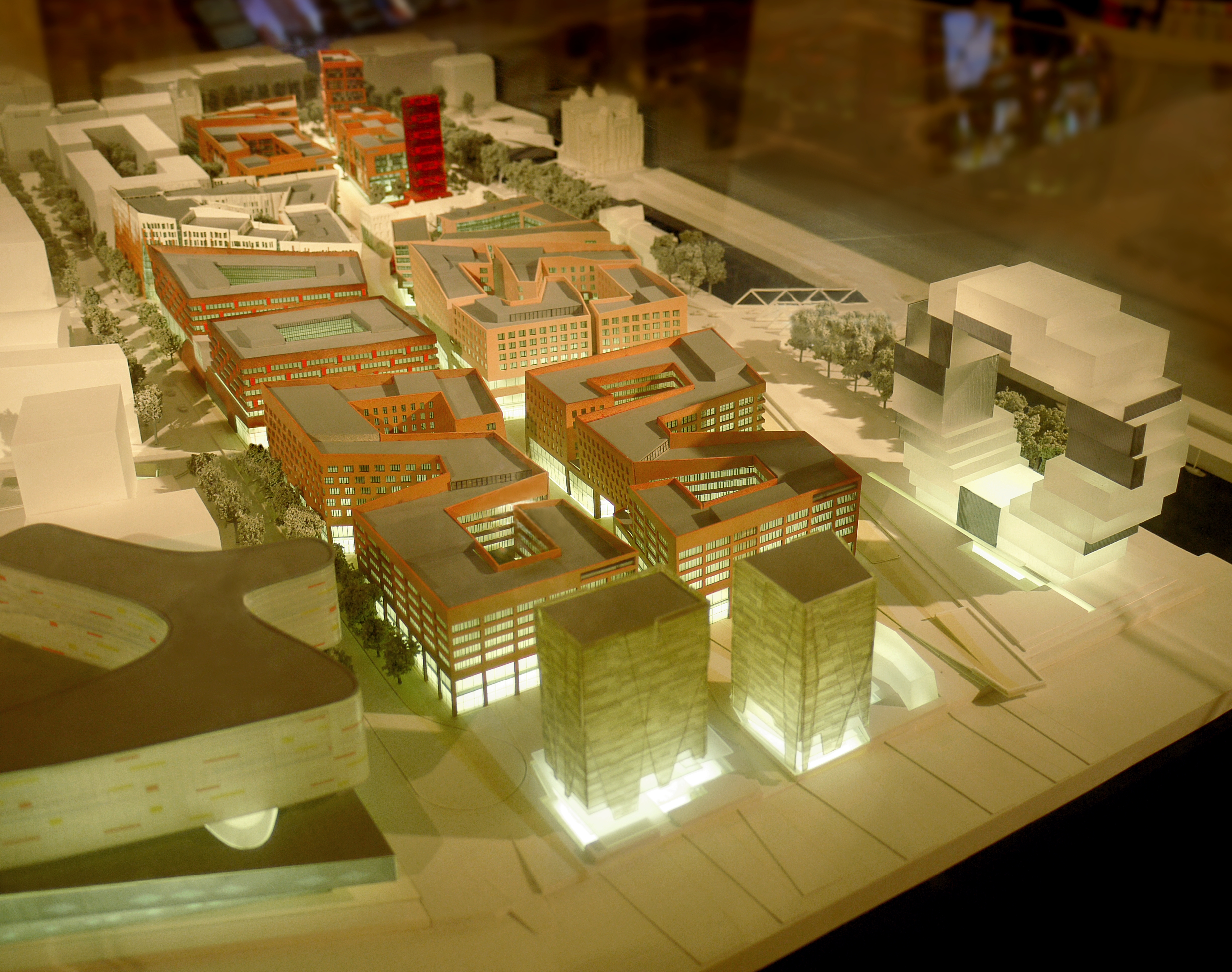 Modell des Science Centers in Hamburg.